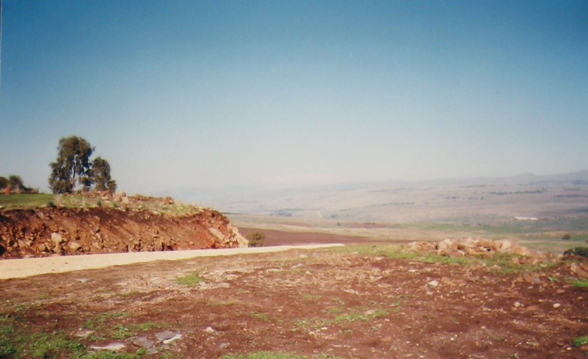 De Golan Hoogte bezien vanuit Israel